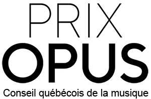 Logo